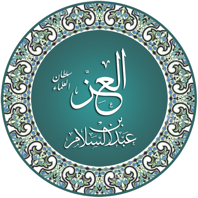 مخطوطة العز بن عبد السلام سلطان العلماء باستخدام خط الثلث